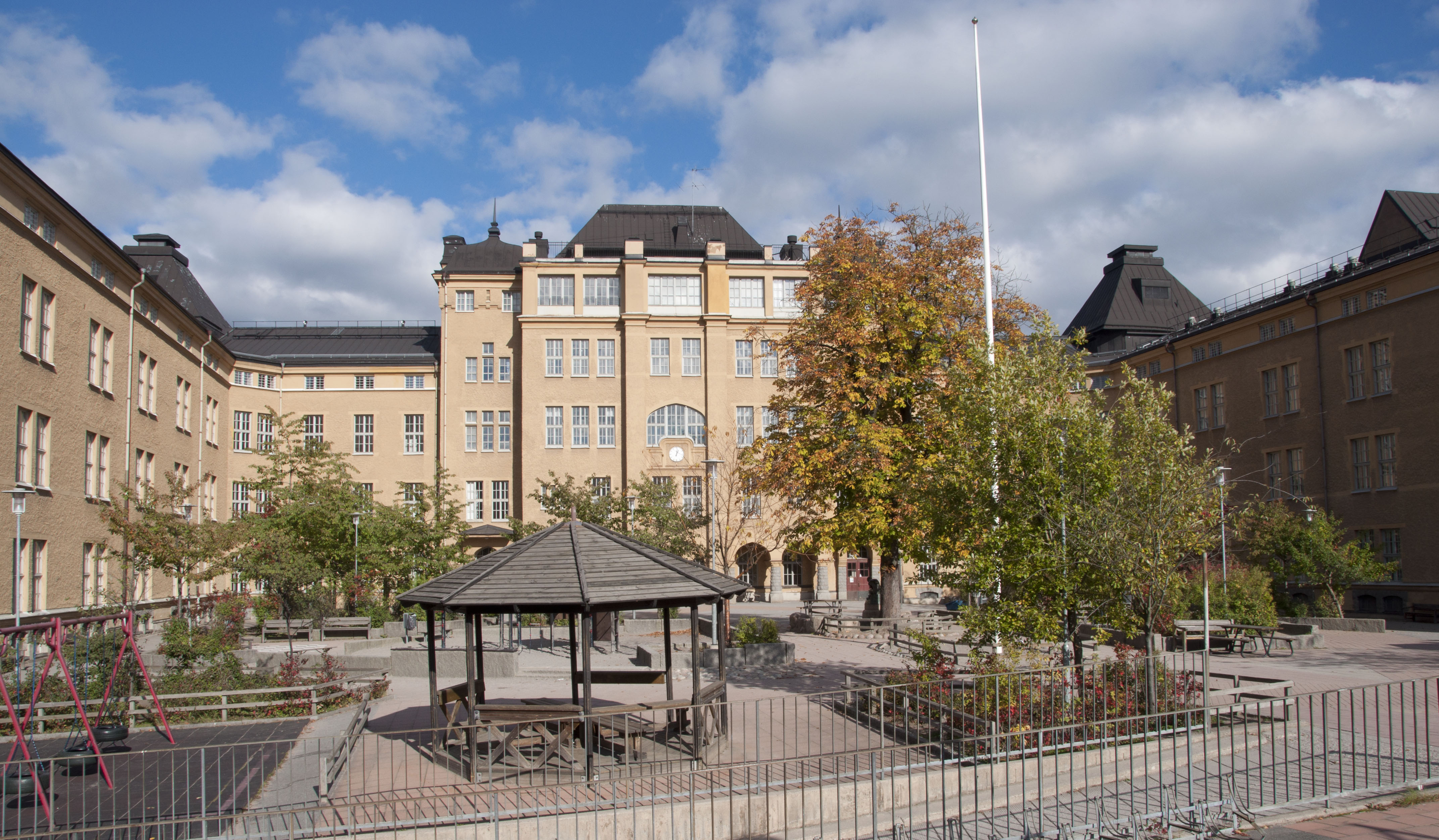 Engelbrektsskolans skolgård